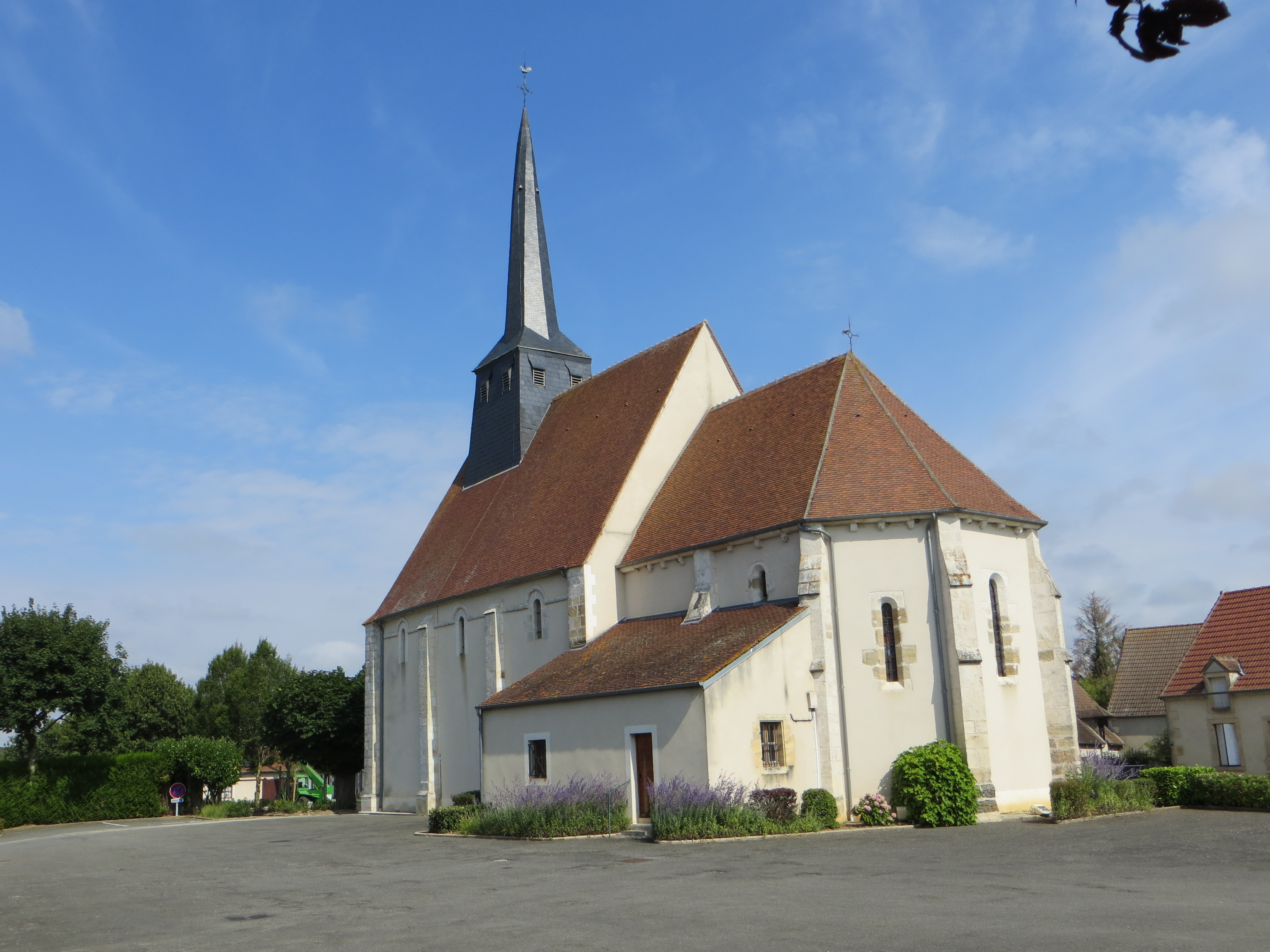 Vue générale de l'église